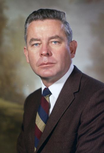 Senator Martin J. Durkan, 1967